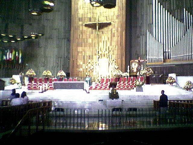 Interior de la Nueva Basílica de Guadalupe en México D. F.